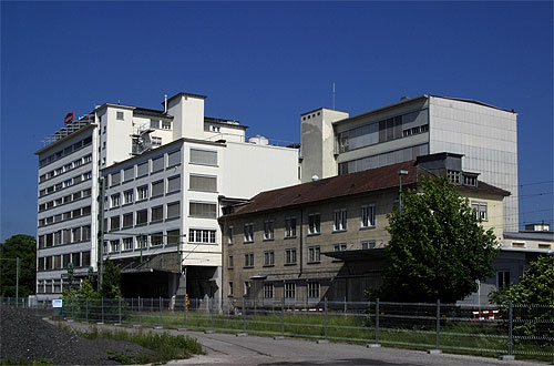 Knorr in Thayngen (Nr. 03.1-5282)